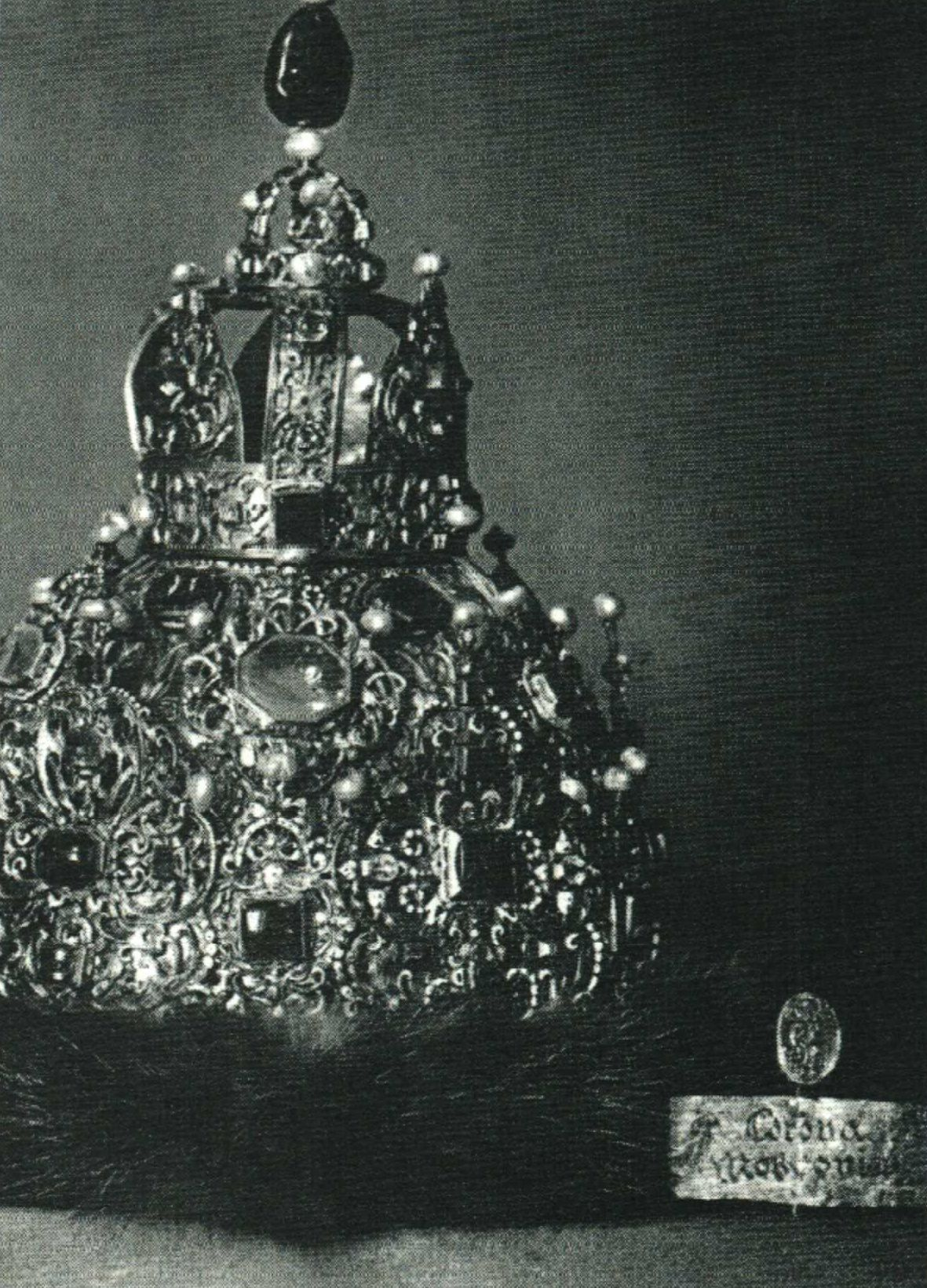 Шапка царя Михаила Федоровича и "сапфир из короны русских государей"